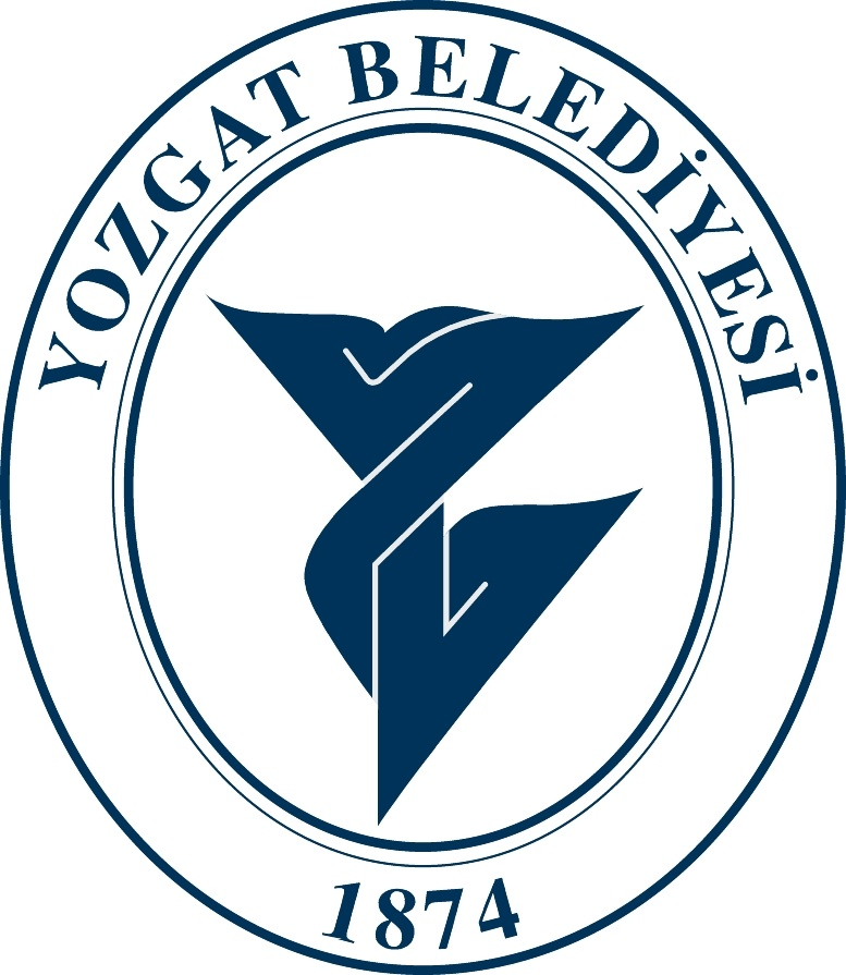 Yozgat (Stadt) Wappen